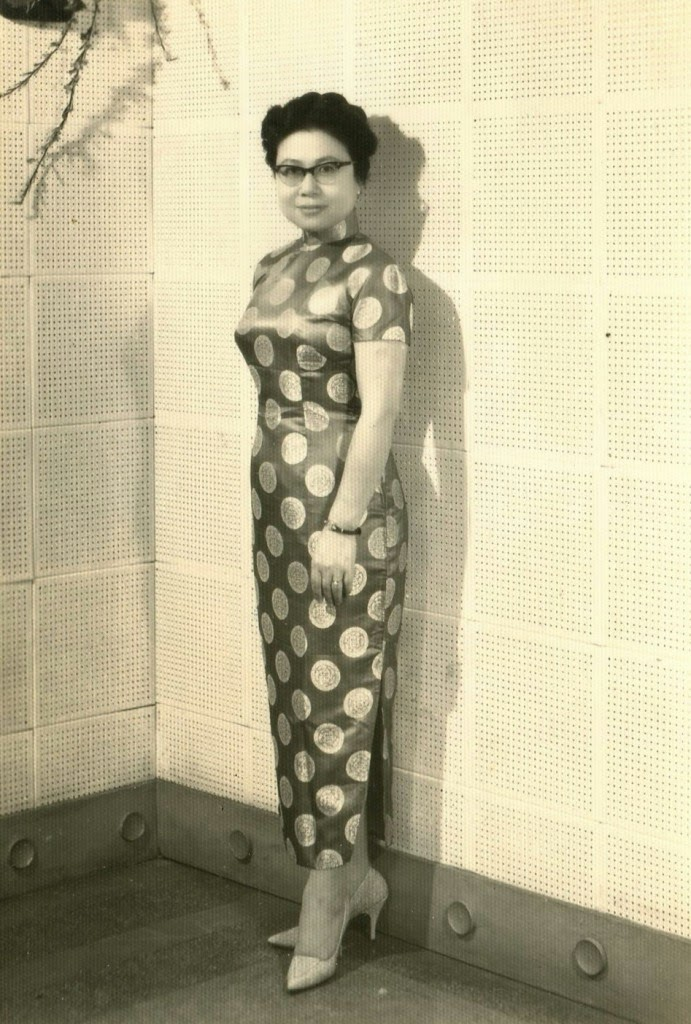 崔小萍在中國廣播公司的留影。